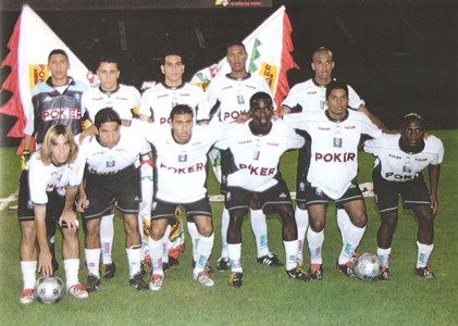 Presentacion del equipo titular e invicto de Once Caldas